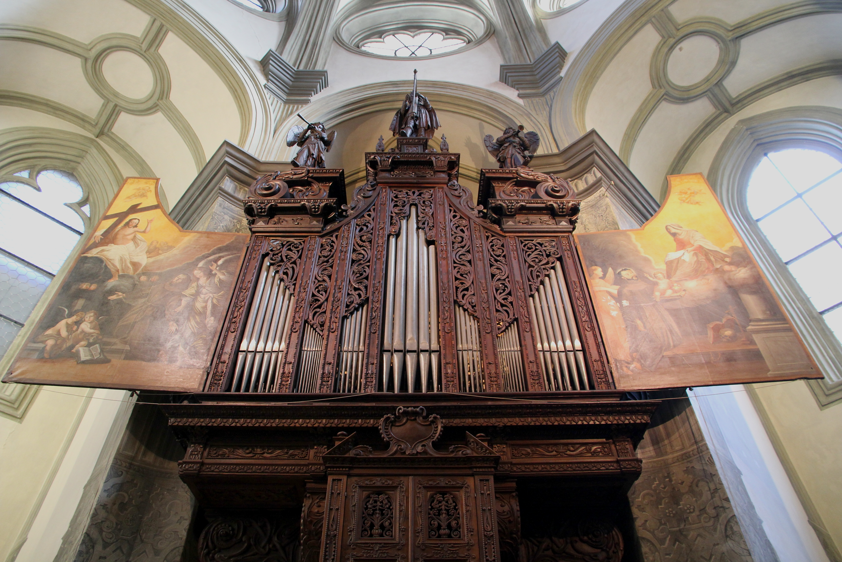 Die Wöckherl-Orgel - Wiens älteste bespielbare Orgel - in der Wiener Franziskanerkirche.